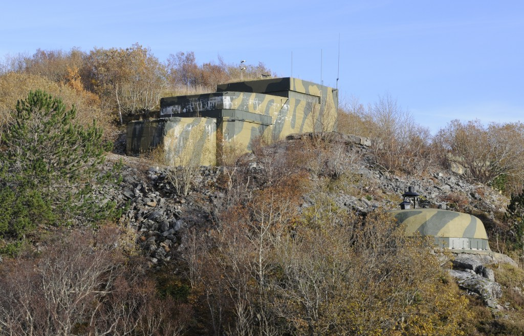 Kommandobunker ved Hysnes fort